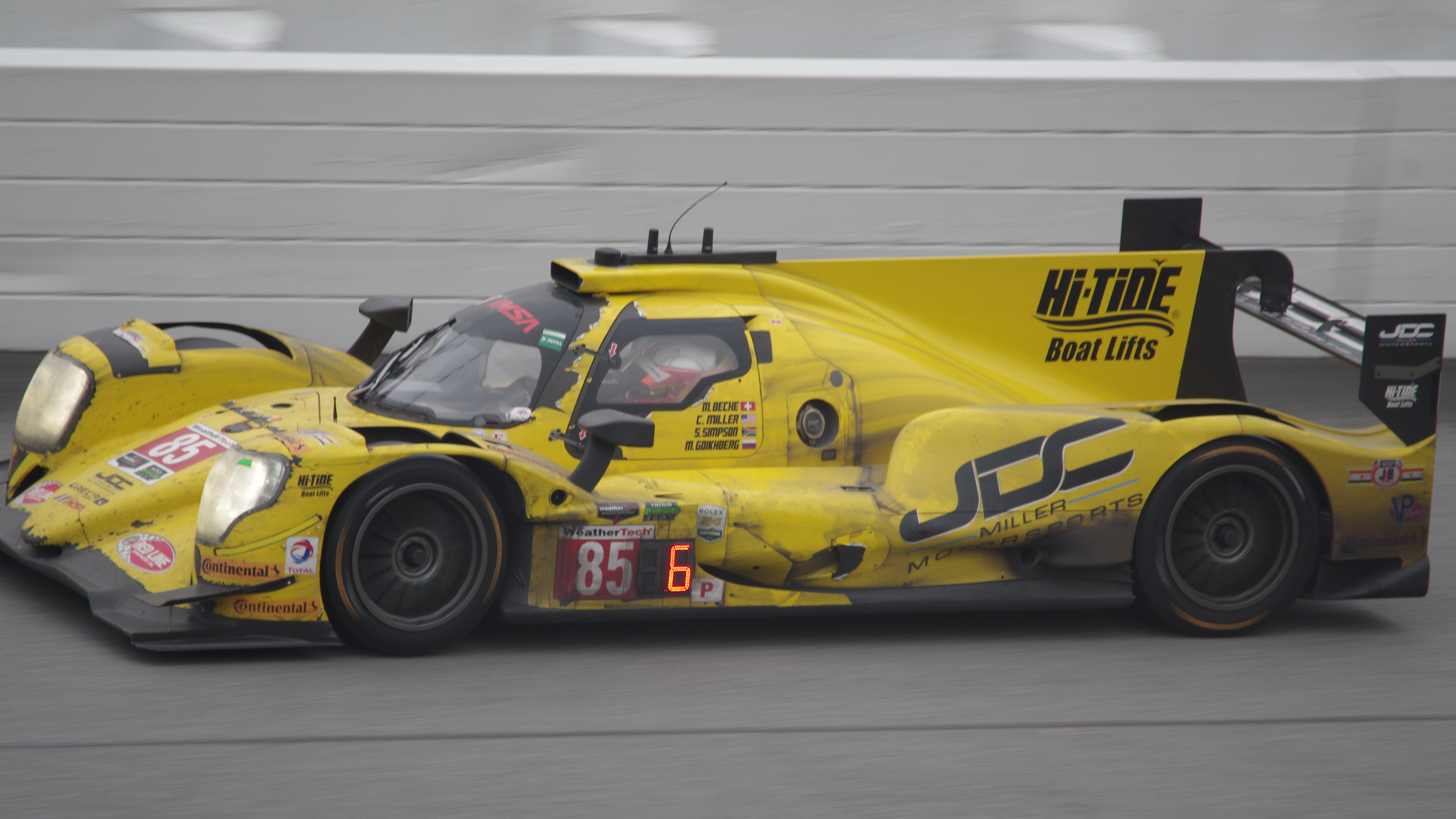 Oreca 07 n°85 du JDC-Miller aux 24 Heures de Daytone 2017 pilotée par Golkhberg, Miller, Simpson, Beche